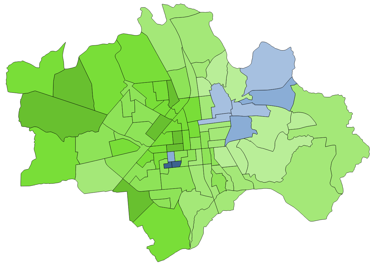 中文（台灣）: 顏色對照表